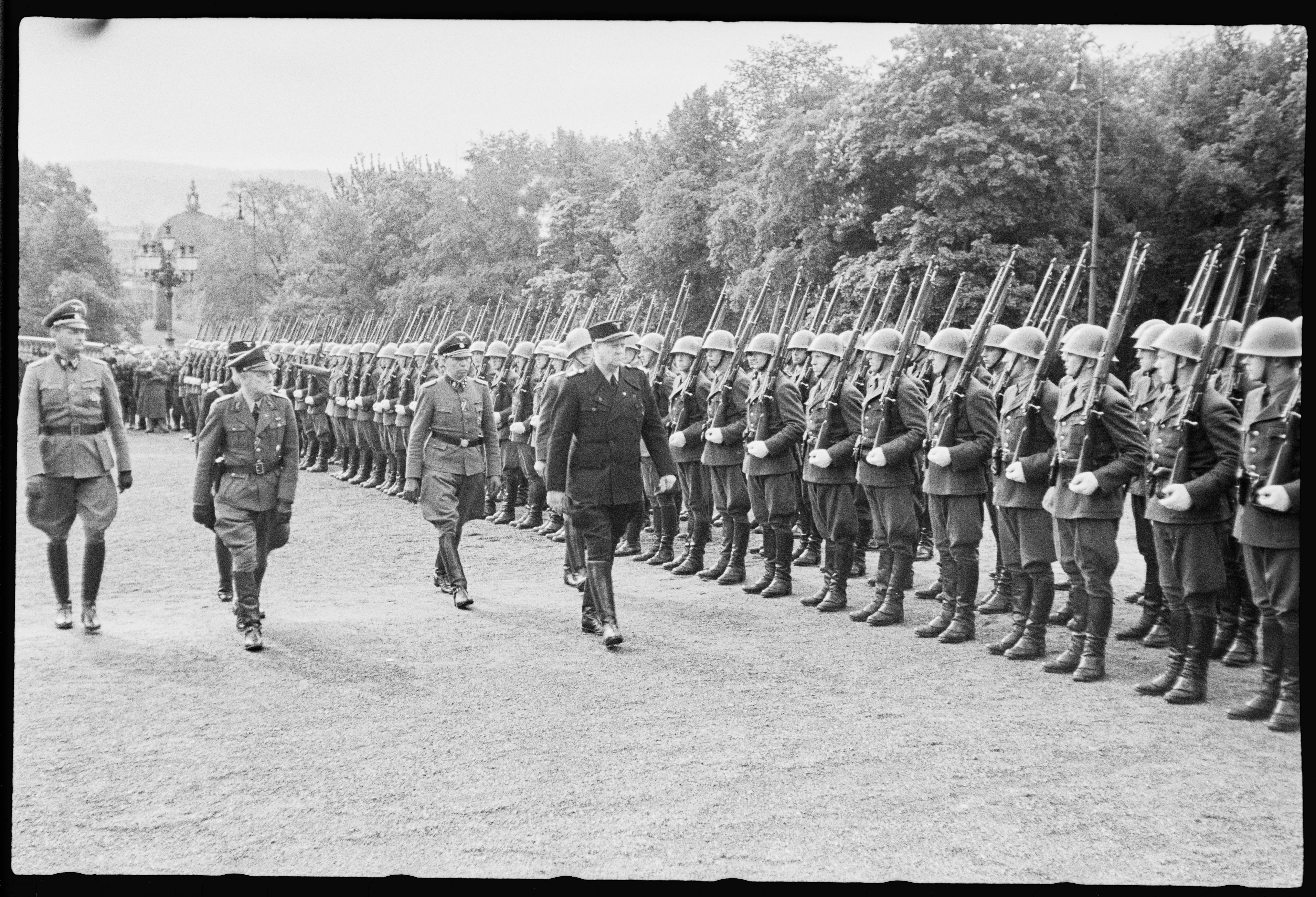 Reservebataljon Holmestrand paraderer for Quisling på Slottsplassen Ifølge fortrolig «NYHETSOVERSIKT FRA SKANDINAVIA. Fra Regjeringens I.K. og Hærens overkommando. (...) Meldinger söndag 14. juni. (1942)» foregikk paraden slik: «Reservebataljon Holmestrand mönstrer. (...) Imorges fant det sted en mönstring av reservebataljon Holmestrand av Den norske legion på Slottsplassen. Samtidig mönstret avdelinger av "förerens" garde, rikshirden og beredskapspolitiet. Avdelingene tok oppstilling i åpen firkant. På den ene siden stod legionens avdeling og dens musikkorps med front mot slottet med "förerens" garde og rikshirden på den annen side av beredskapspolitiet. Mange mennesker hadde innfunnet seg for å overvære mönstringen. Blant de frammötte såes samtlige "ministre", representanter for riksledelsen og en rekke andre representanter for stat og parti. "Föreren" ankom i bil presis kl. 09.30. Etter å ha inspisert avdelingene sammen med Jonas Lie og andre holdt han en kort tale.» Terje Emberland skriver i boka Himmlers Norge: «Som Kongsvinger festning var leiren i Holmestrand en SS-innretning som tjente til å forberede nordmenn på det fremtidige SS-kontrollerte Norge. På ulike tidspunkter var det senter for opplæring av Hirden, Den norske legions reservebataljon og Vaktbataljonen.»